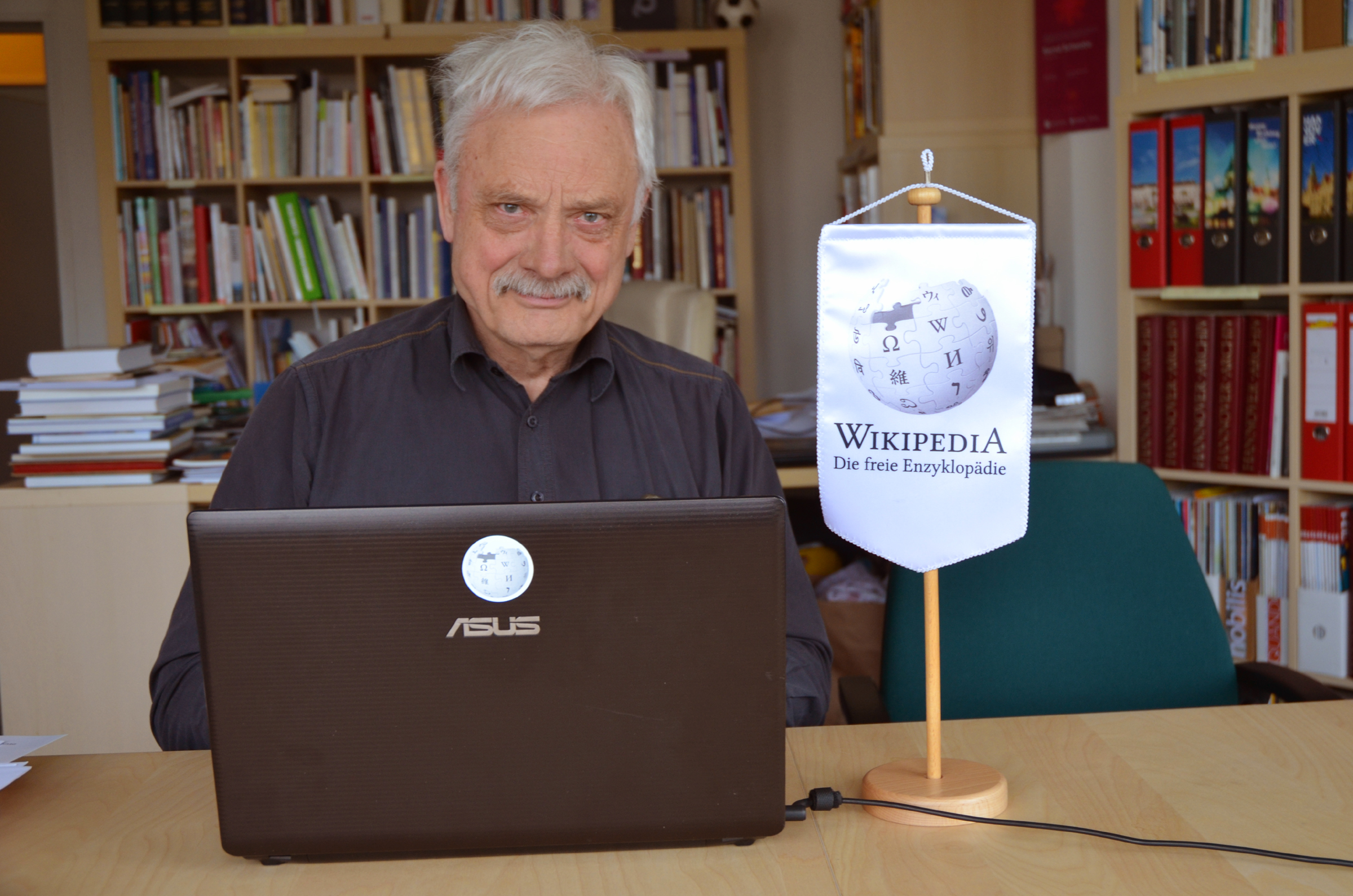 Der Buchautor und Motorjournalist Eckhart Bartels bei seiner Anmeldung am 27. März 2018 im Wikipedia-Büro Hannover ...